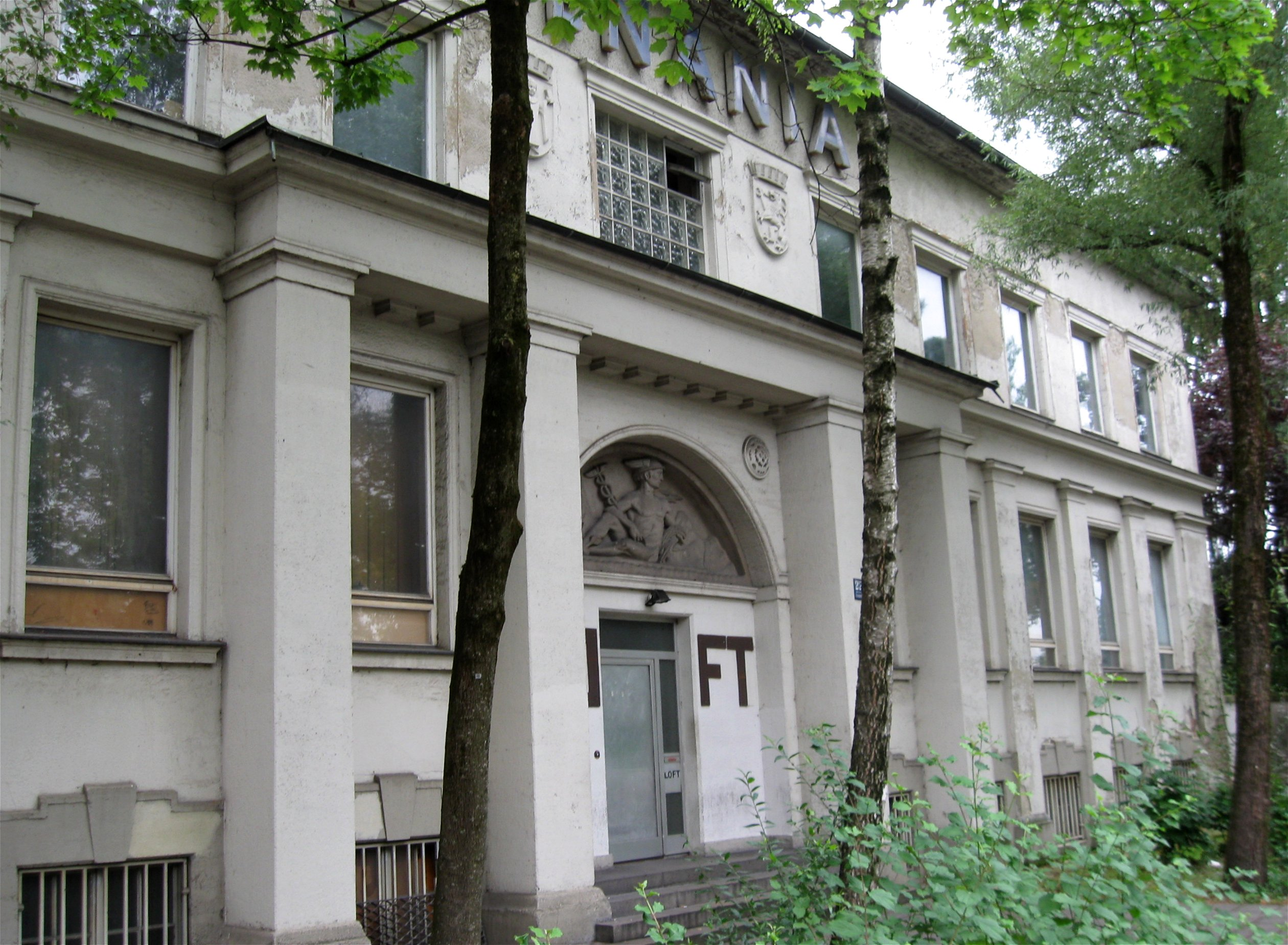 Friedenstraße 22; ehem. Verwaltungsgebäude Firma Rhenania, zweigeschossiger Walmdachbau mit Pilastergliederung und Merkurrelief im Bogenfeld über dem Eingang, neuklassizistisch, um 1920.